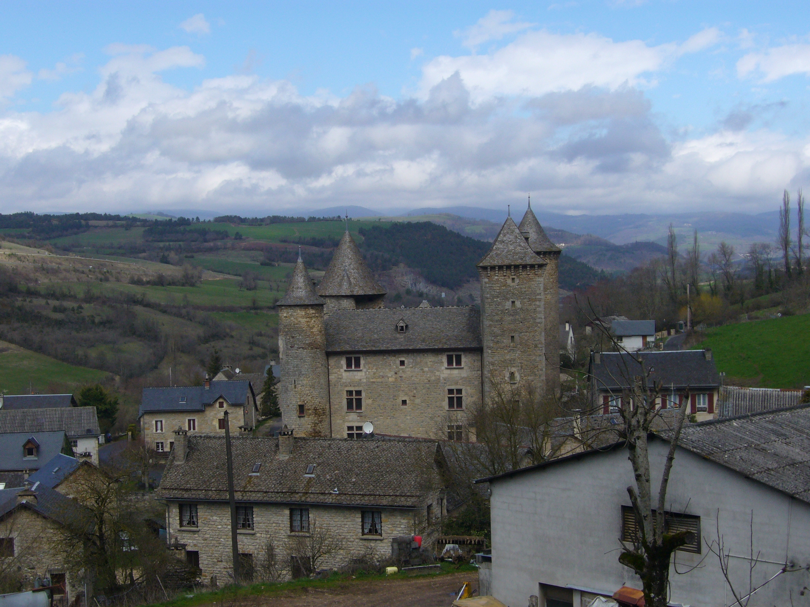 Le village de Saint-Saturnin, Lozère, France